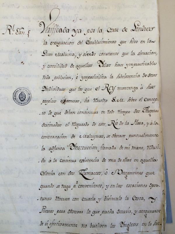 Real Orden de España del 9/8/1776. Informa que Londres verificó la evacuación de Puerto Egmont y se ordena controlar que no vuelvan.